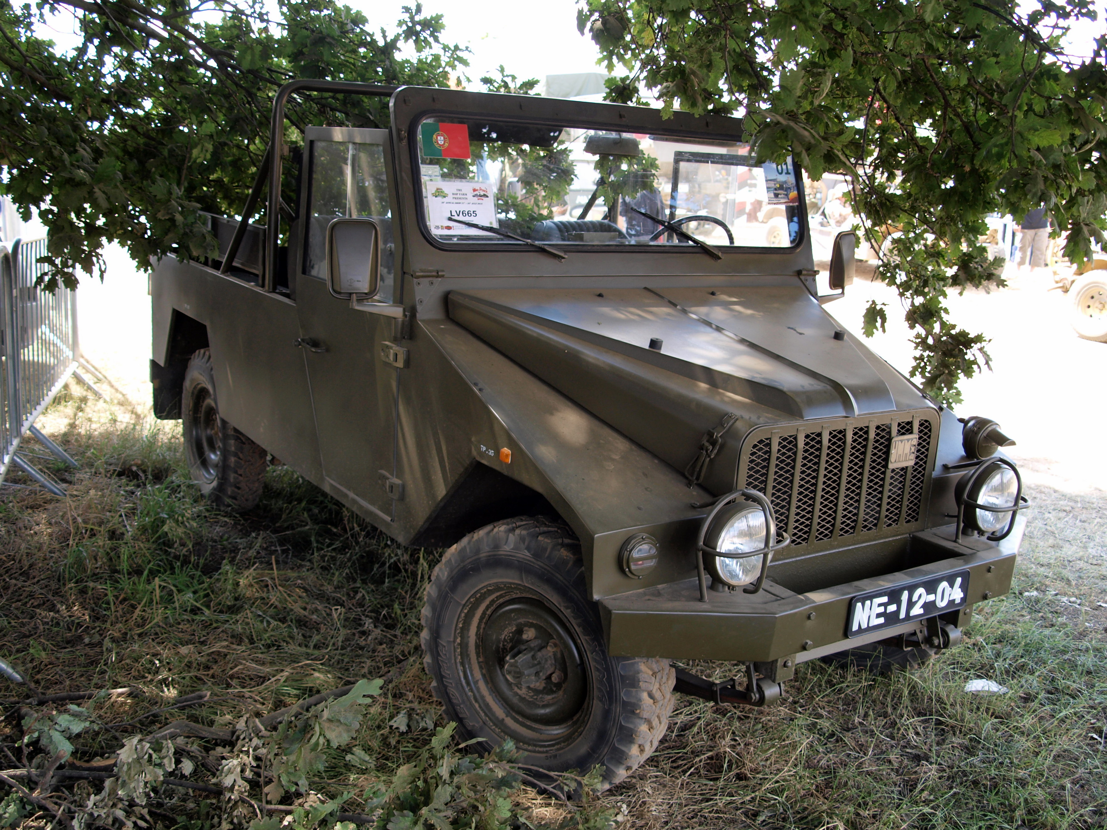 UMM Entrepeneur (1983) (owner Alberto Rebelo).